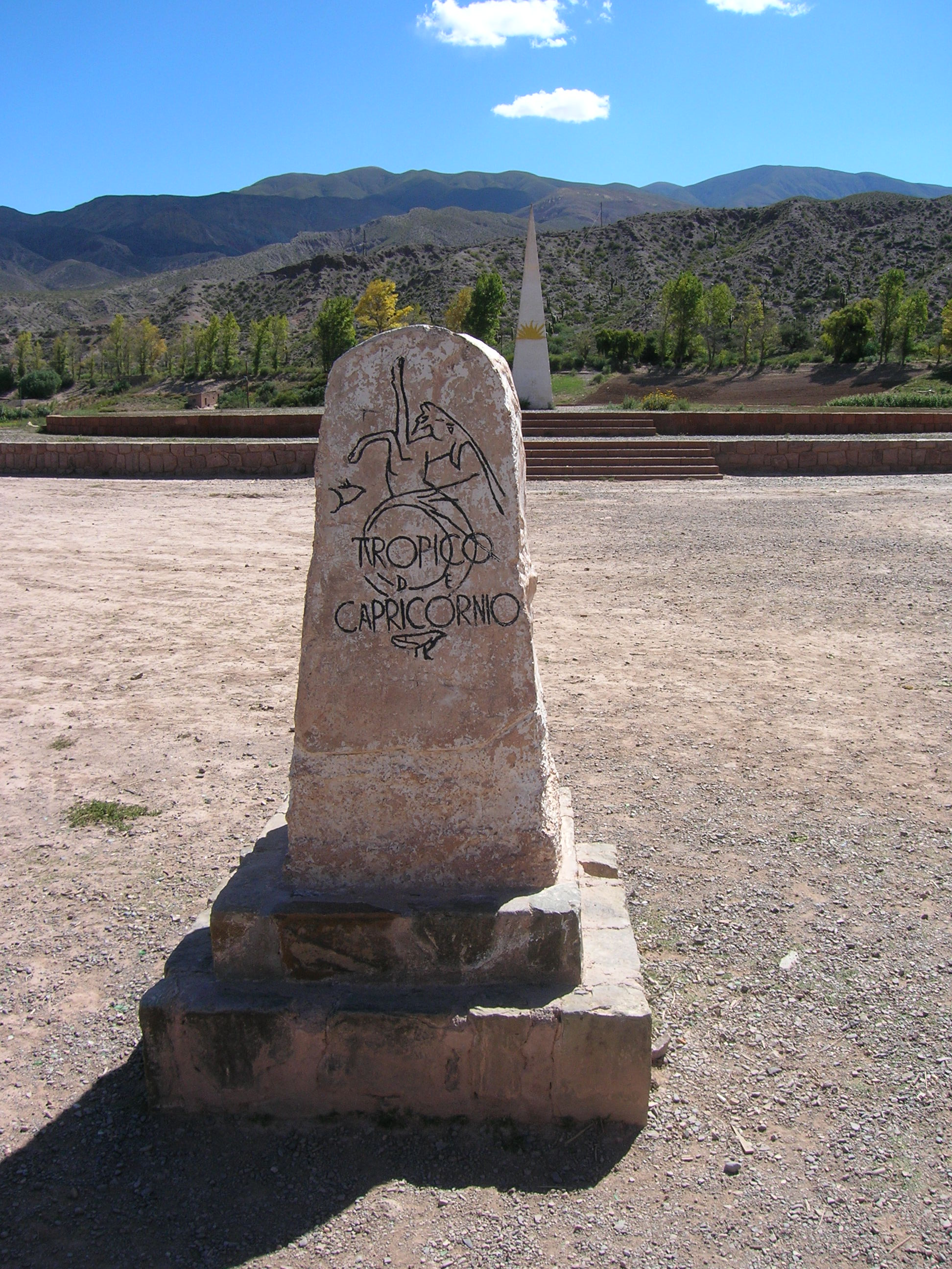 Trópico de Capricornio. Sobre Ruta Nacional 9. Cerca de Huacalera. Provincia de Jujuy. República Argentina.